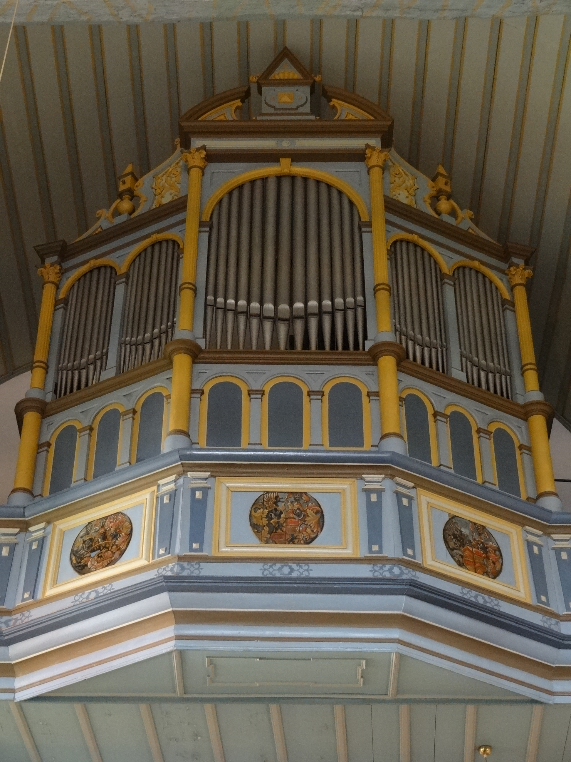 Evangelische Pfarrkirche Münzenberg